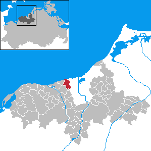 Elmenhorst/Lichtenhagen in Mecklenburg-Western Pomerania - District Bad Doberan